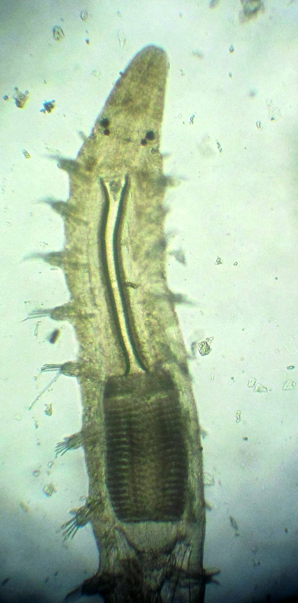 Exogone verugera, Calafuria (LI), mesolitorale.